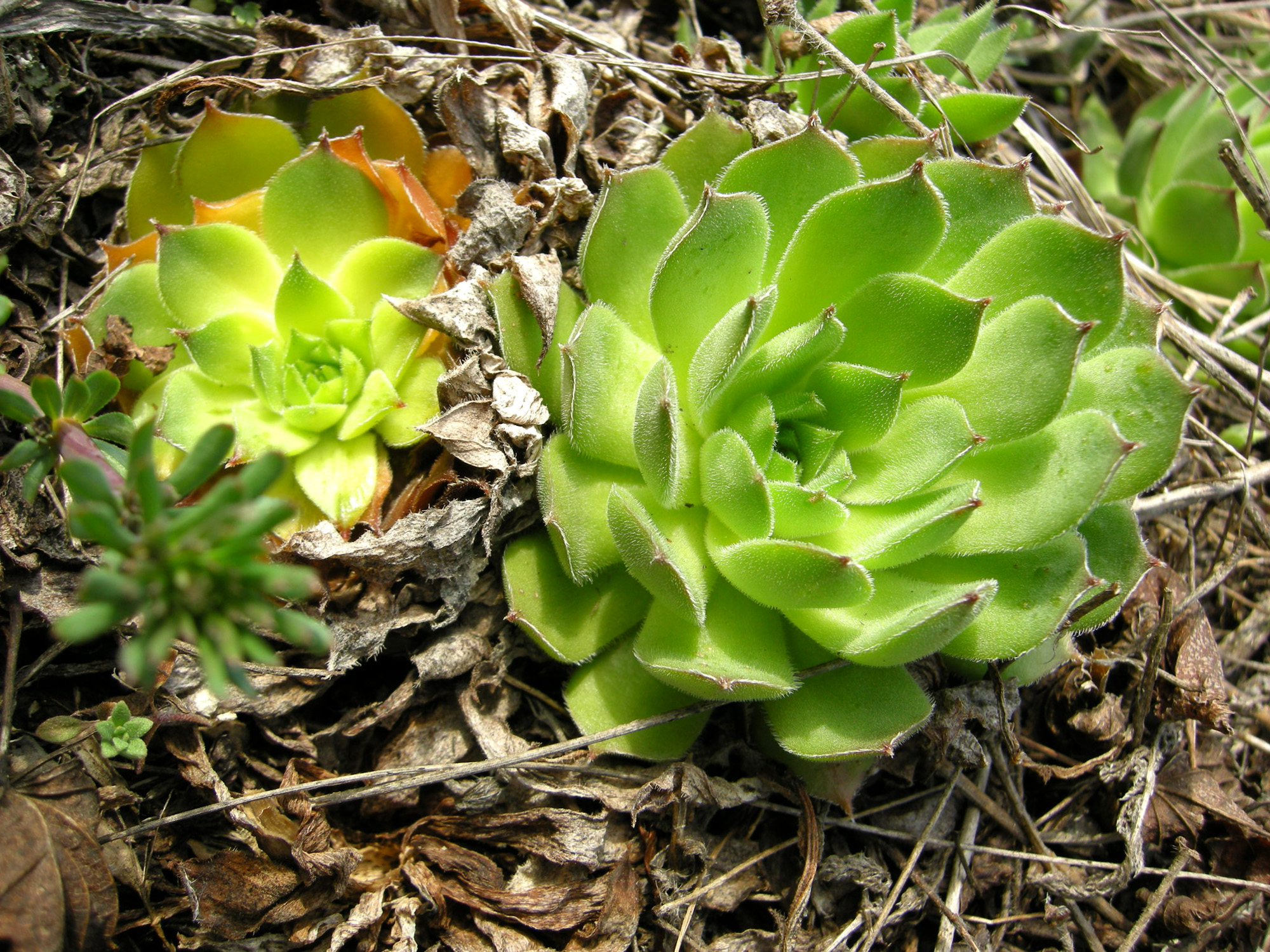 Молодило руське (лат. Sempervivum ruthenicum Schnittsp) (інша назва — молодило українське; народна назва: свинячий хліб) — сукулентна рослина роду Молодило (Sempervivum) з родини товстолистих (Crassulaceae).